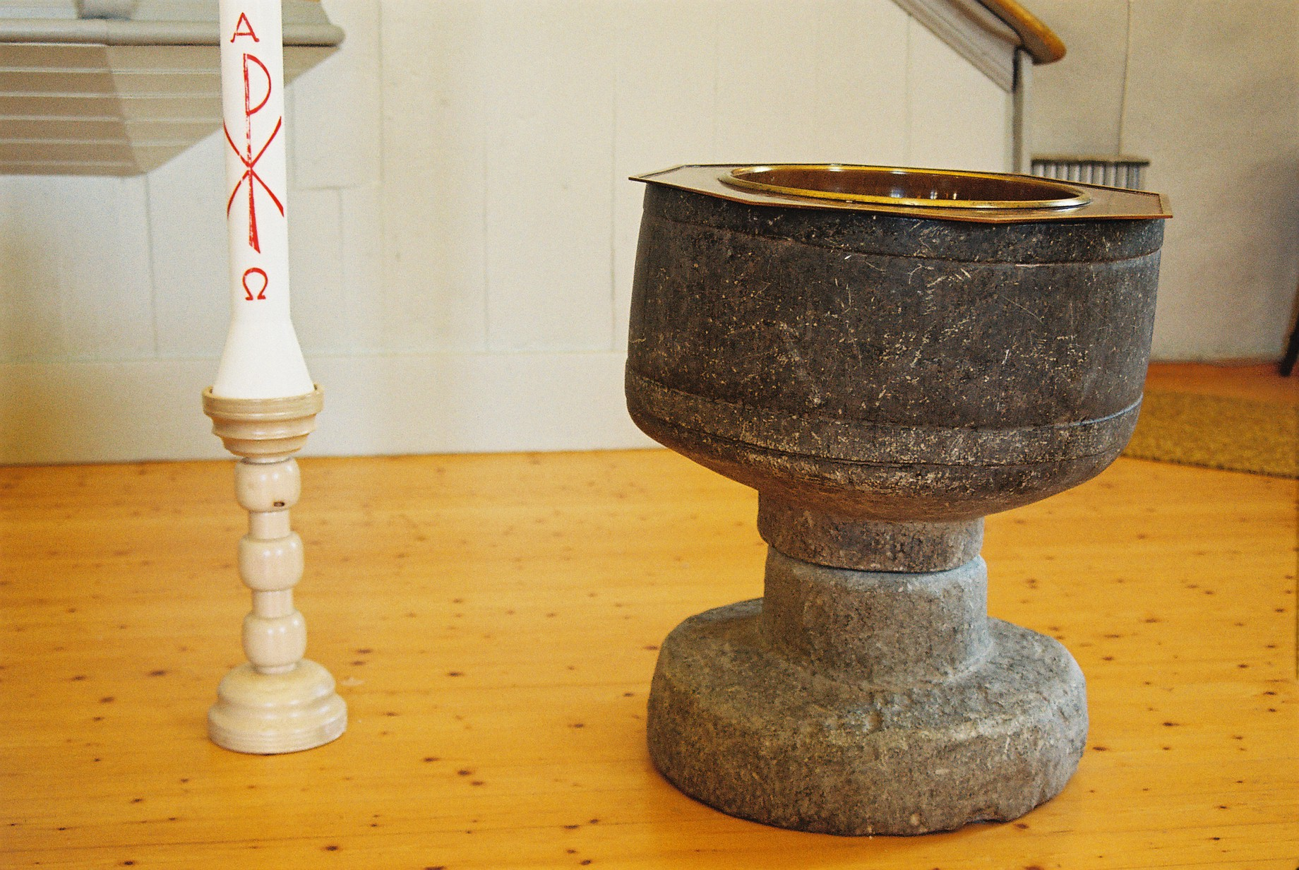 Dopfunt